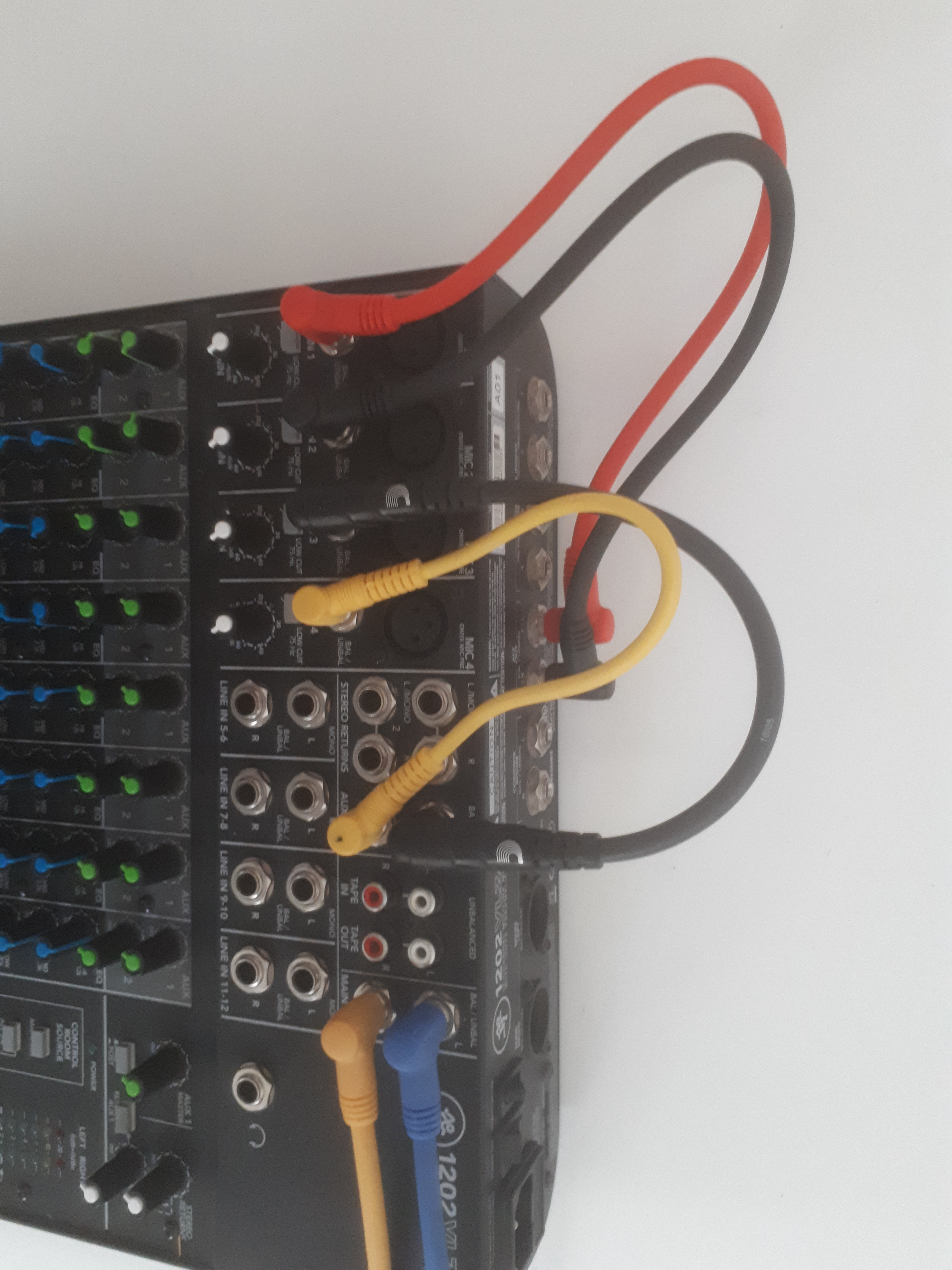 Close view of typical wiring for a no input mixer